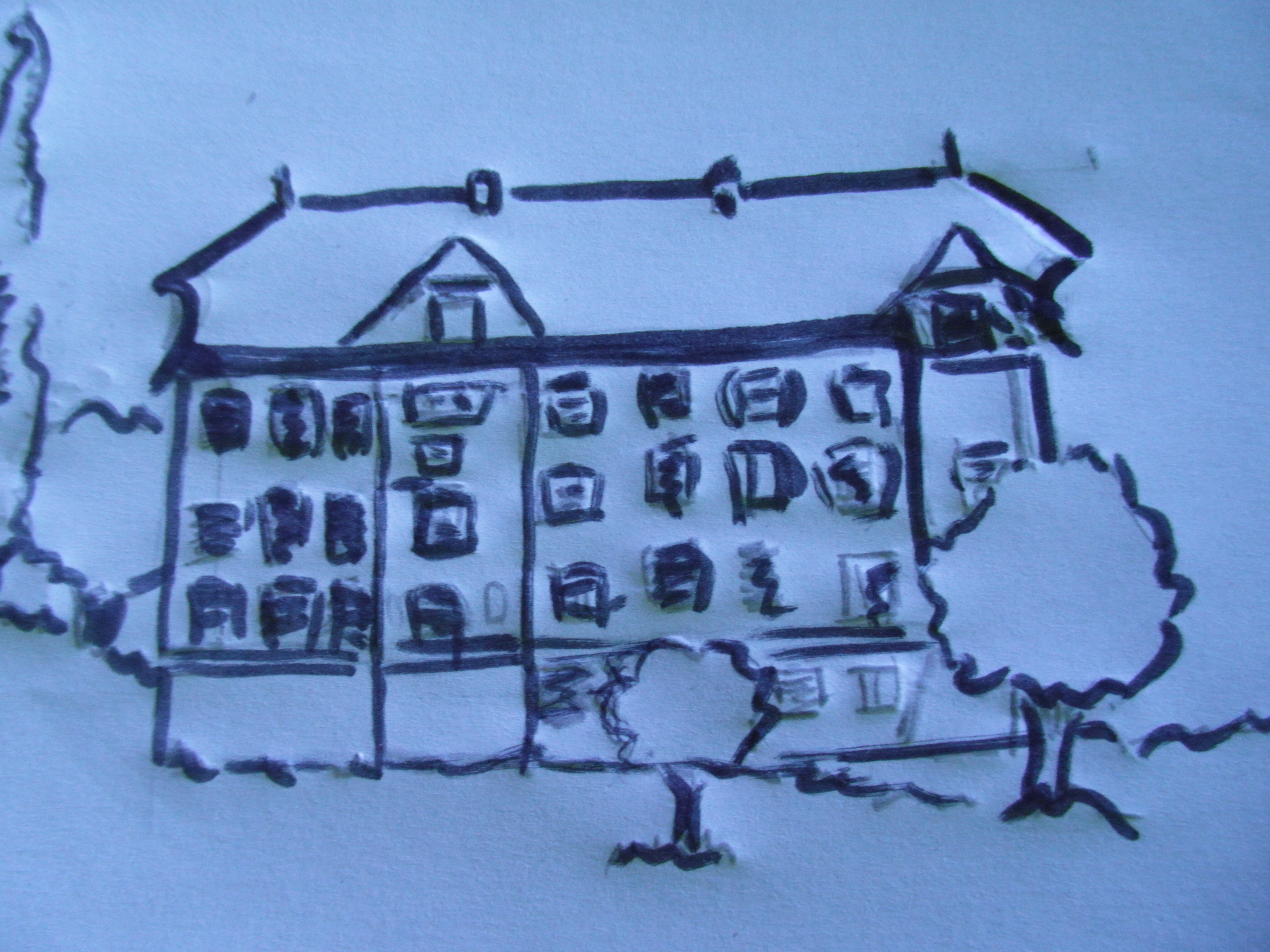 Dessin à l'encre du Grand Hôtel de Villard-de-Lans